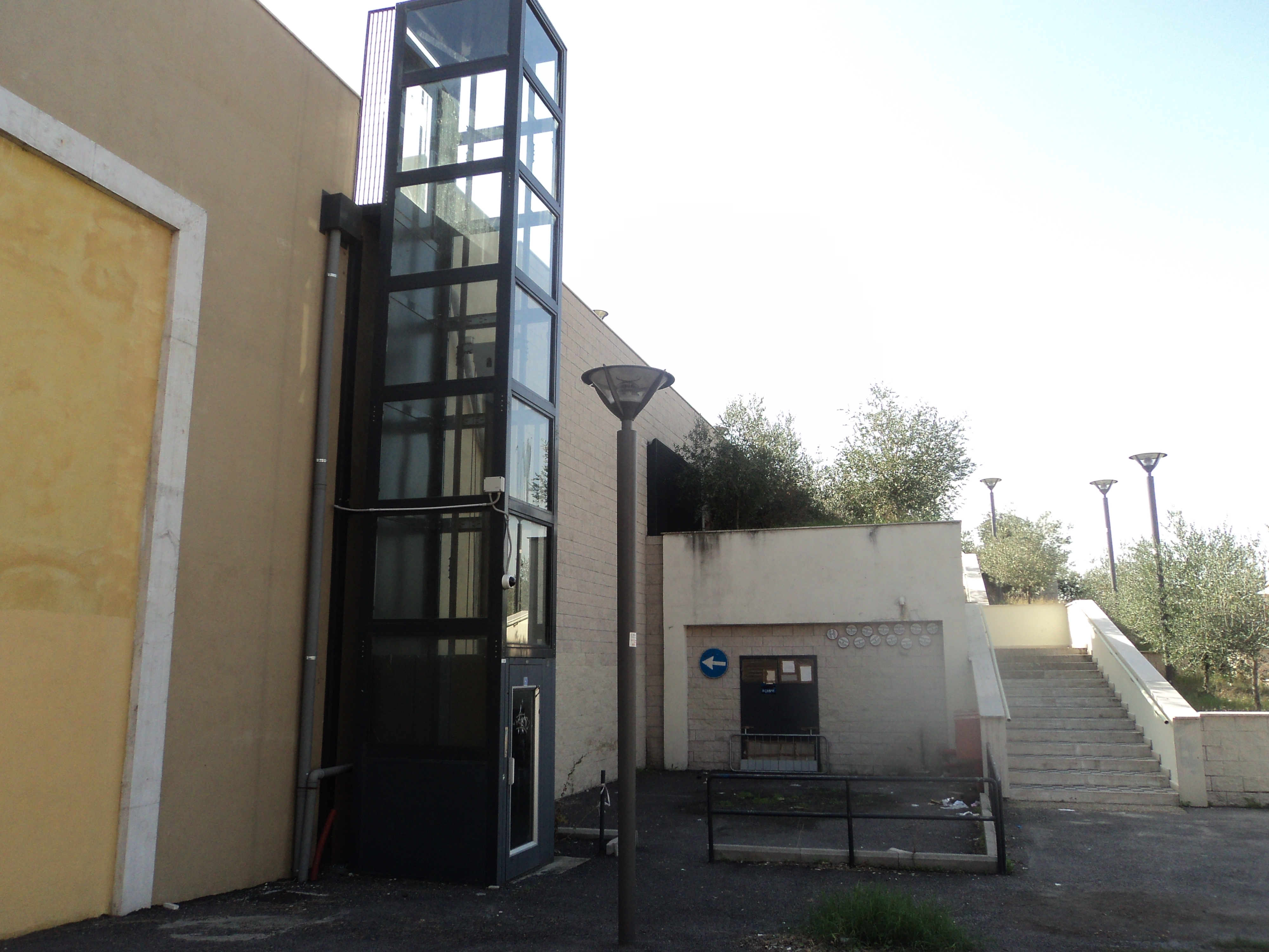 Stazione La Rustica Città. Per altre foto